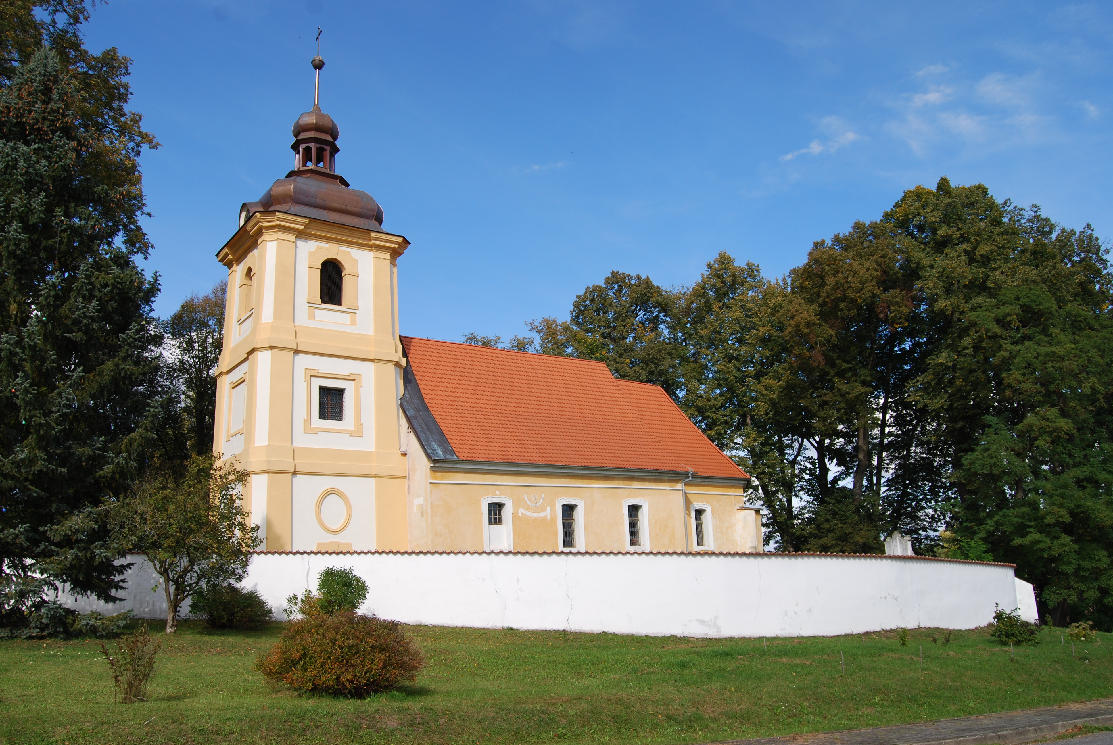 Kostel Nejsvětější Trojice. Rataje (okres Tábor). Česká republika.